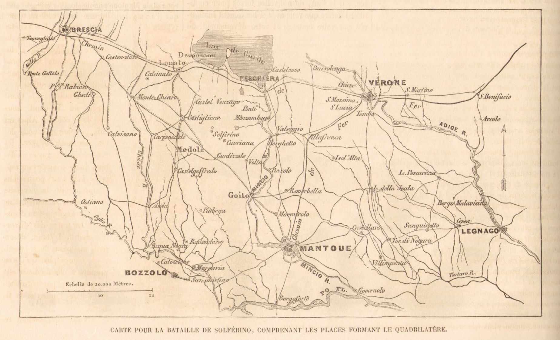 Carta della zona della battaglia di Solferino e San Martino (24 giugno 1859)